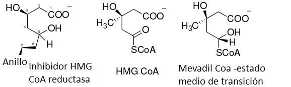 HMG CoA interacciones